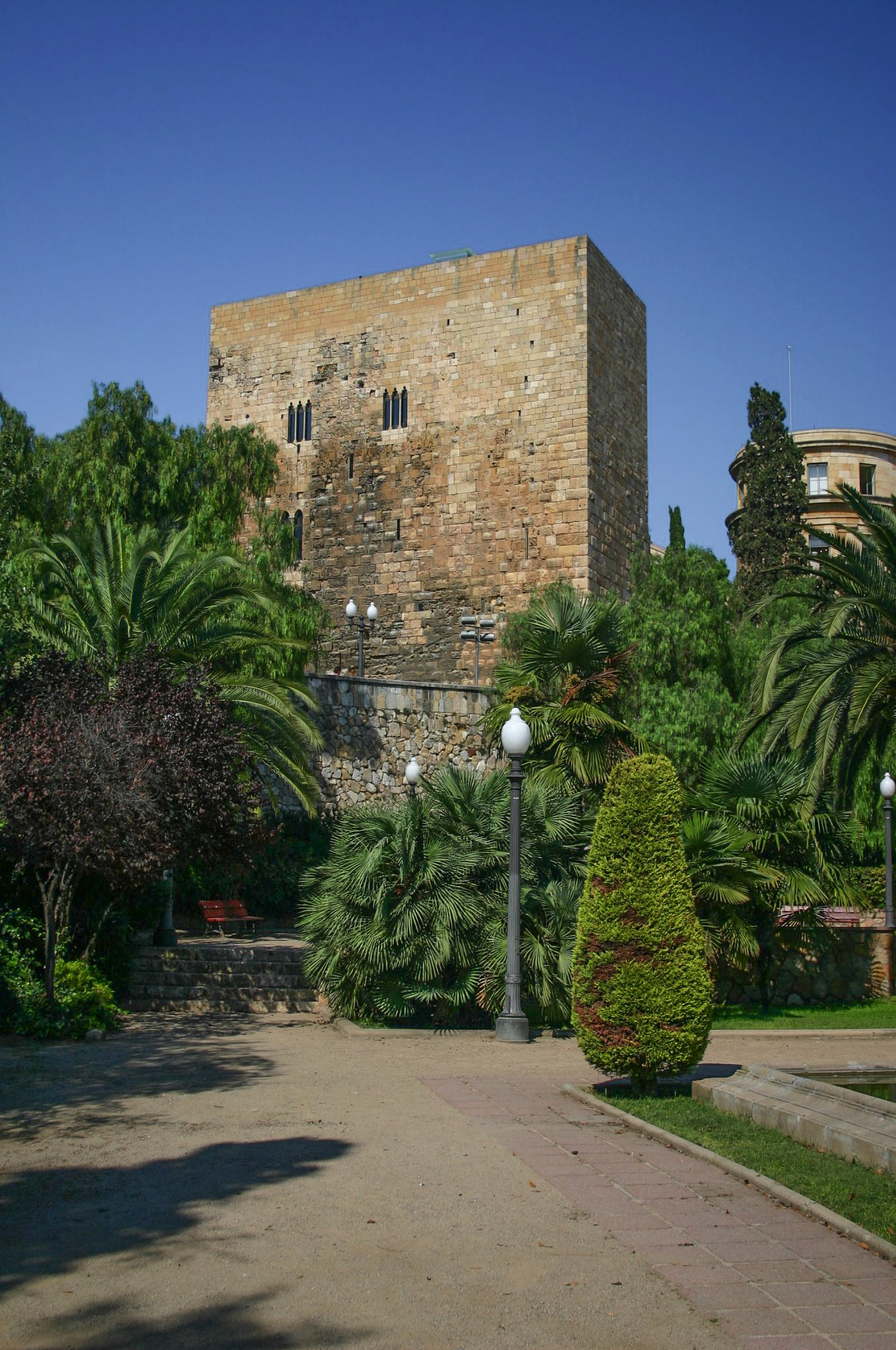 Tarragona. Torre del Pretorio Camera: Canon EOS-300D